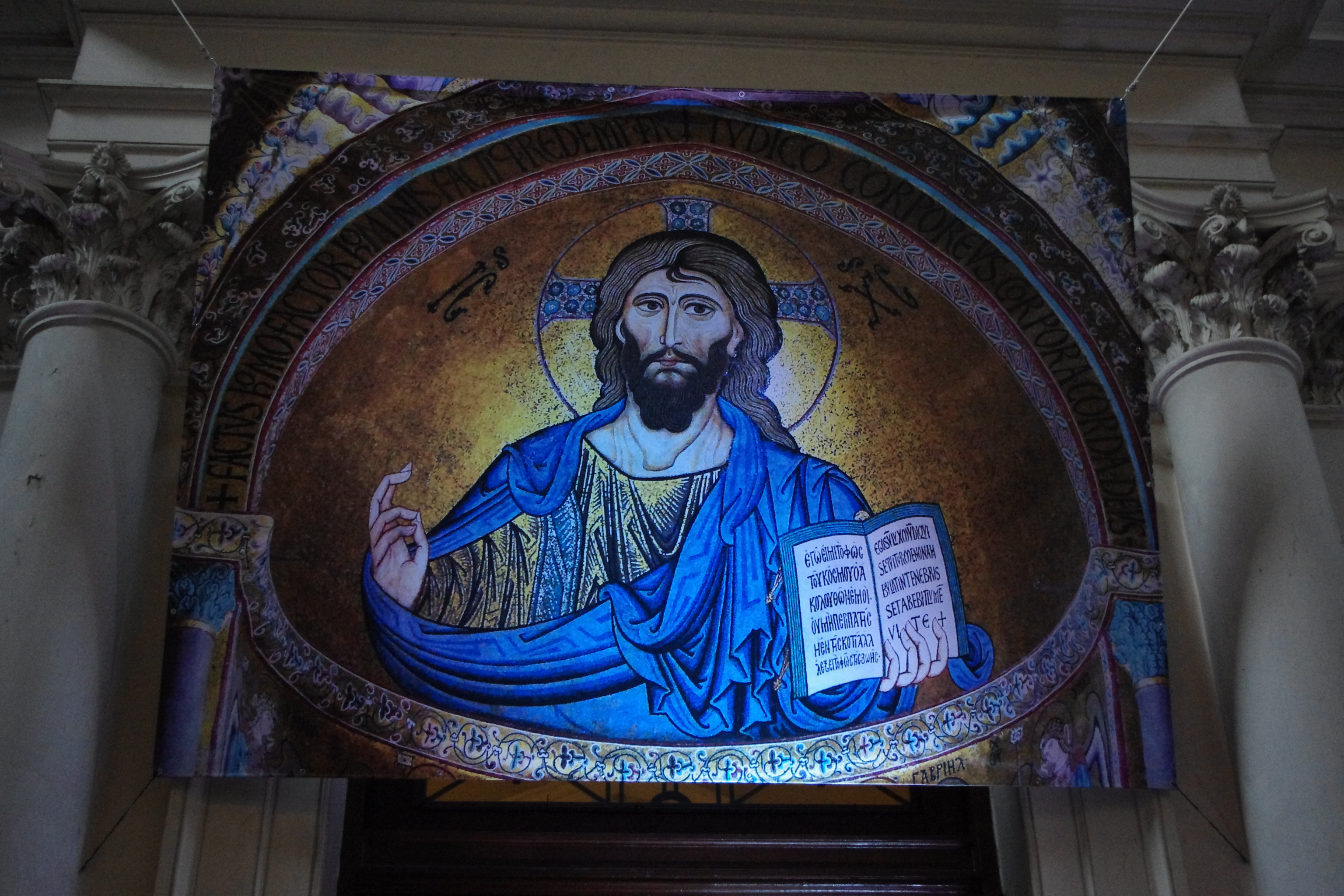 Oficjalna ikona Roku Wiary 2012/2013 w Kościele Wszystkich Świętych w Warszawie. Ikona przedstawia Chrystusa Pantokratora z bazyliki w Cefalù